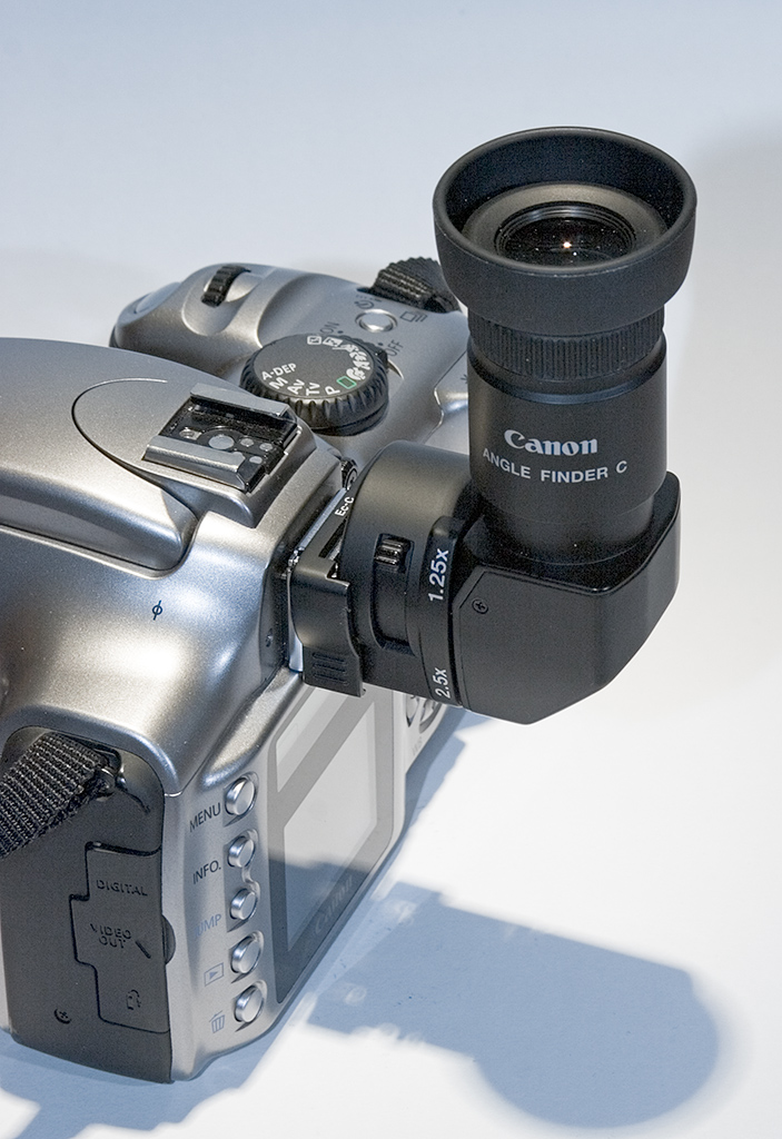 Winkelsucher